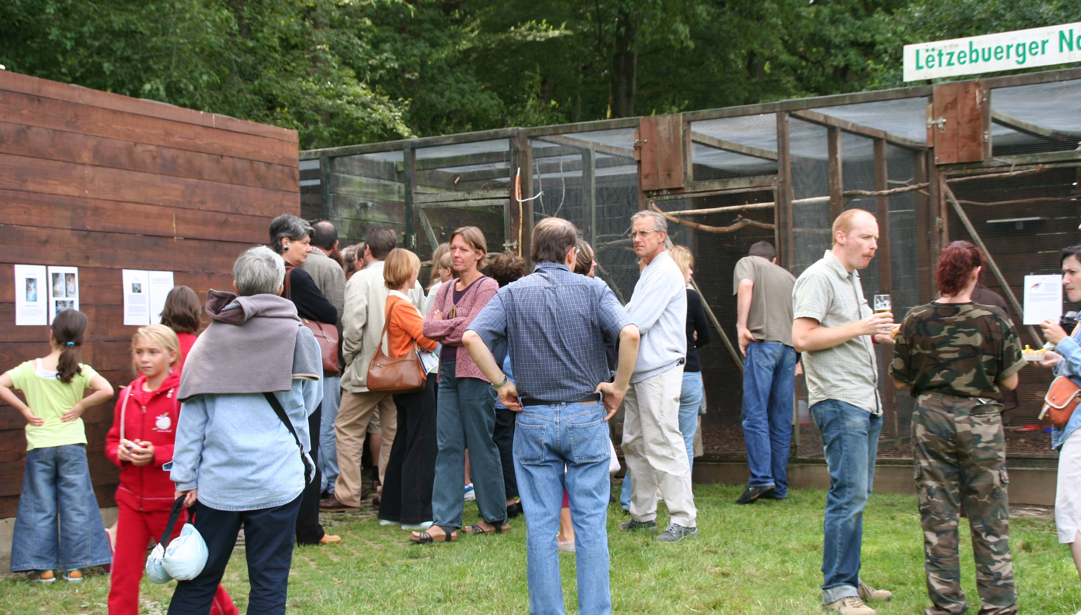 Diddelenger Fleegestaioun fir wëll Déieren.